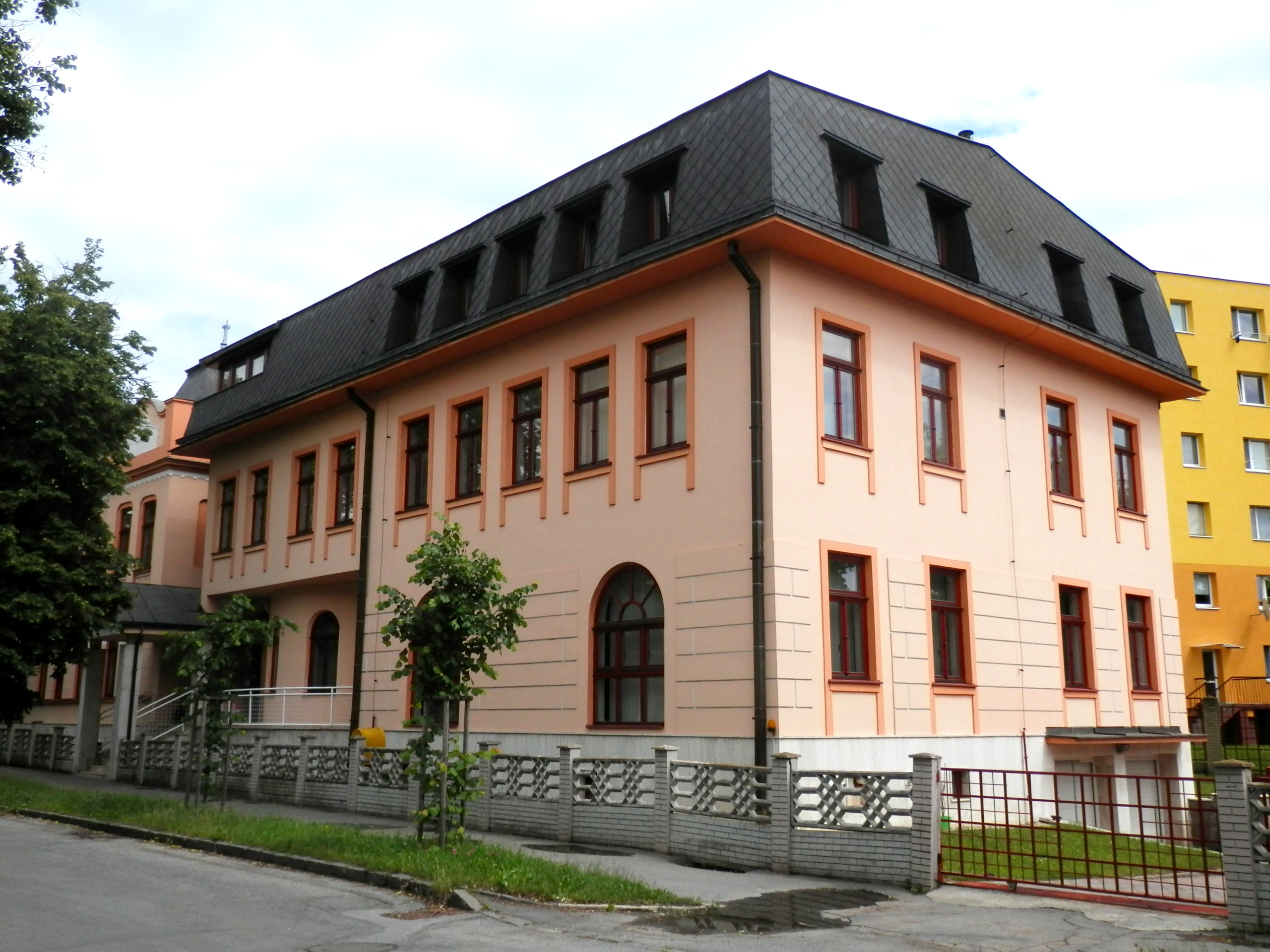 Budova v ktorej sídli Prešovská pravoslávna eparchia. Mesto Prešov. Ulica Budovateľská č.1